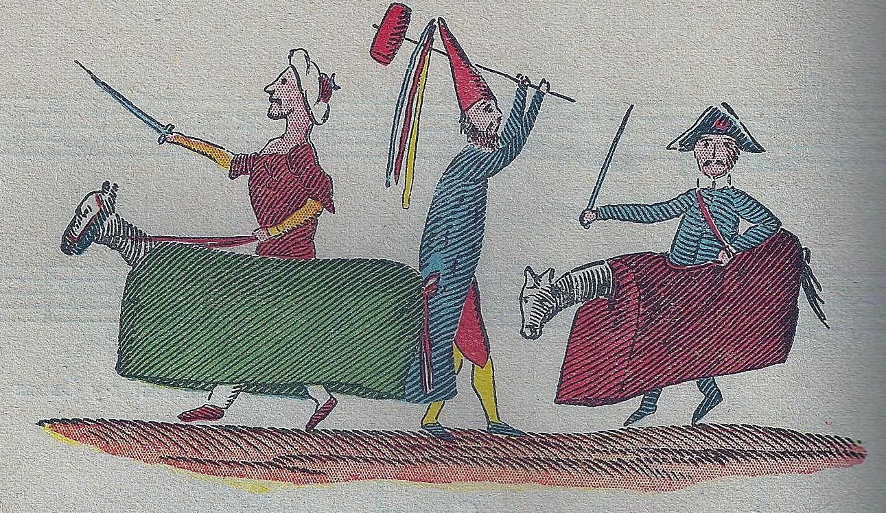 Dibuix del Ball de Cavallets fet per Andreu de Bofarull abans del 1890